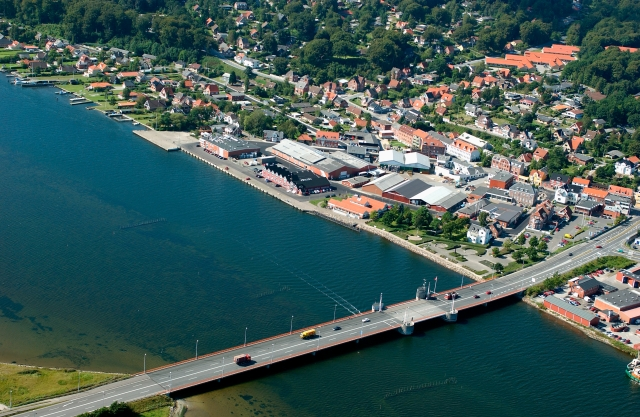 Hadsund Havn set fra sydøst i 2002.